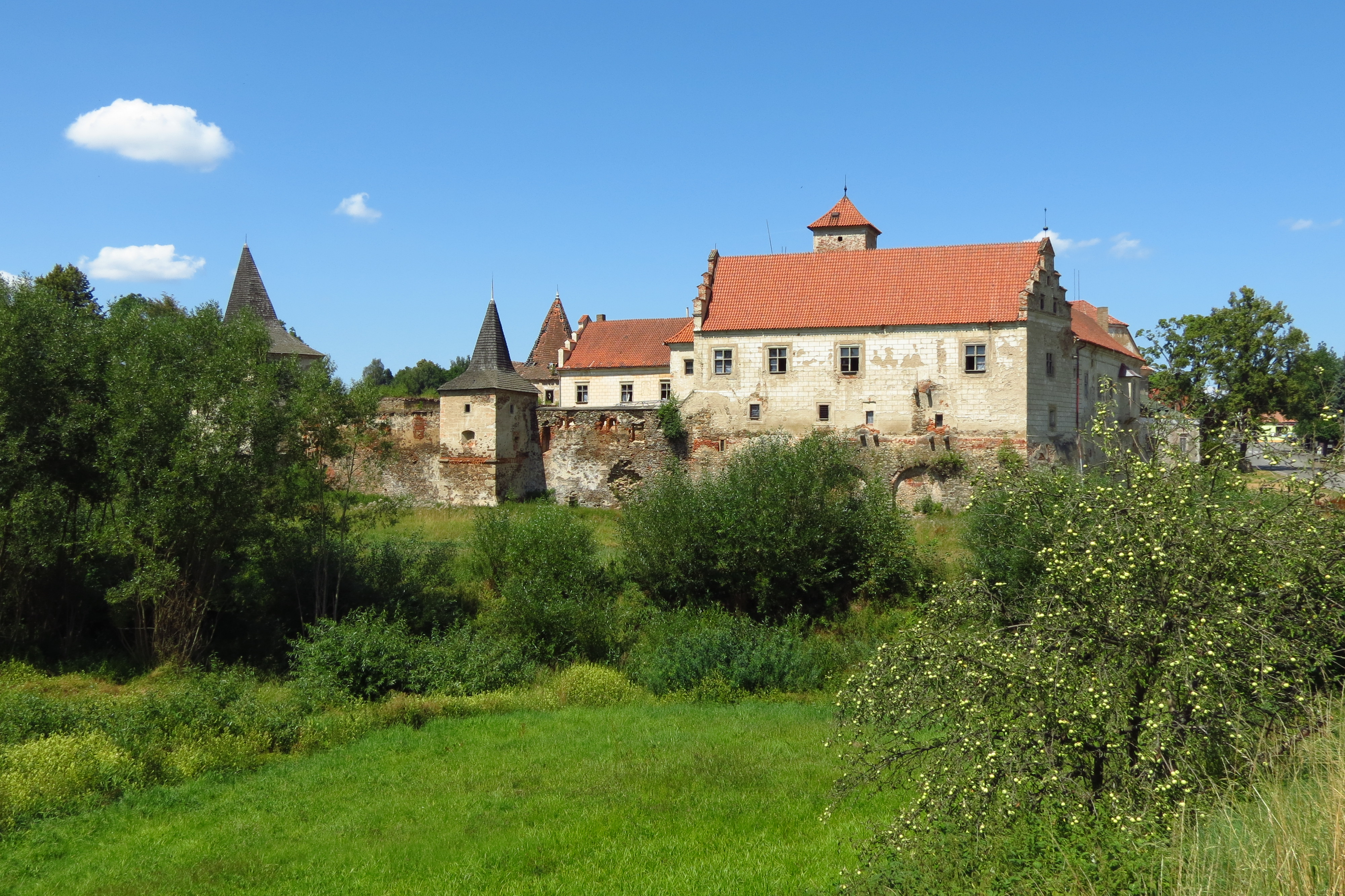 Červená Řečice, renesančně-barokní zámek poblíž Pelhřimova